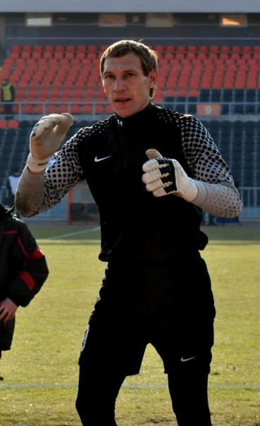 Игорь Шуховцев — украинский футболист.